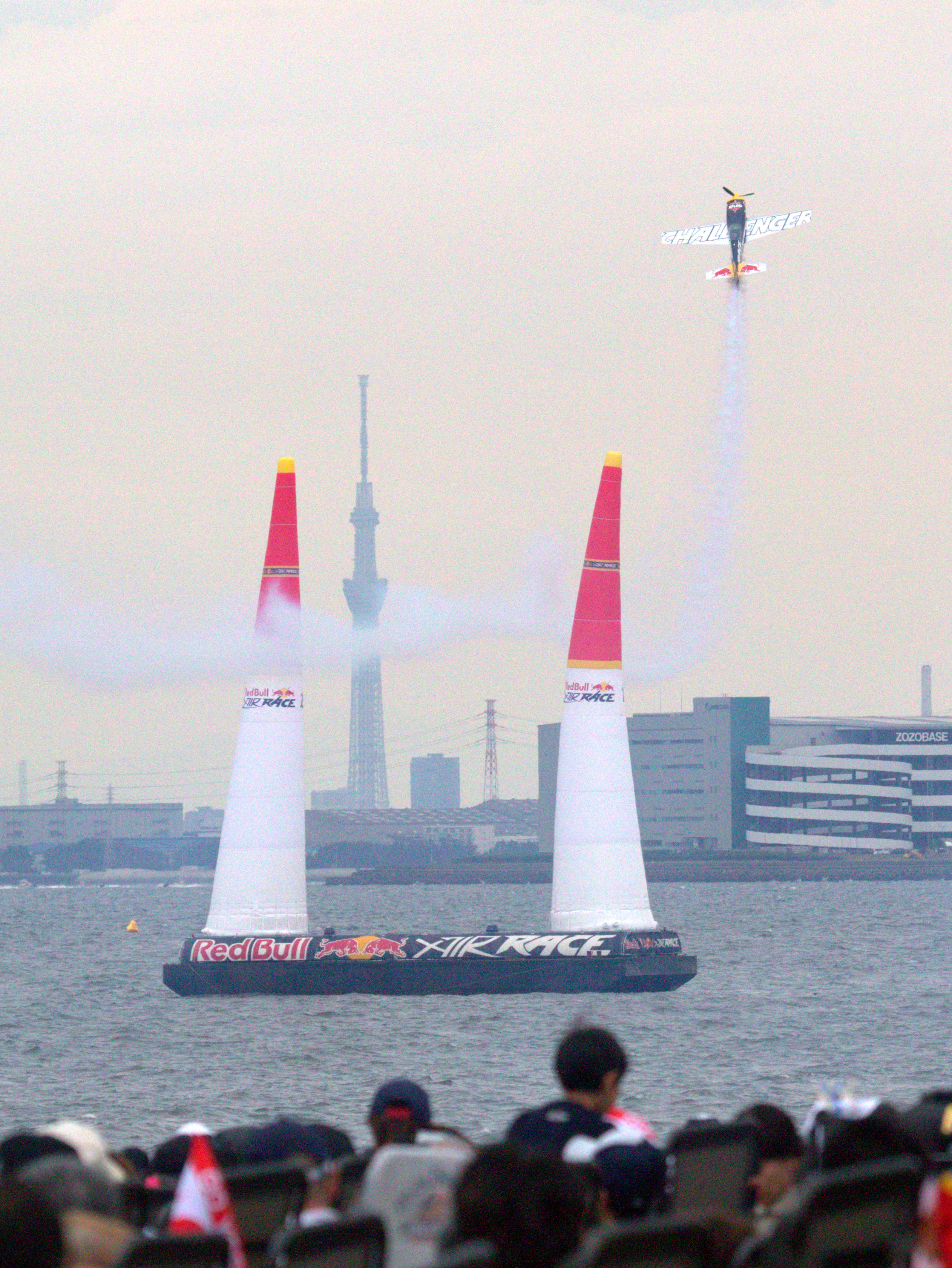 2016年レッドブル・エアレース・ワールドシリーズ 千葉で撮影。 エクストラ 330LX